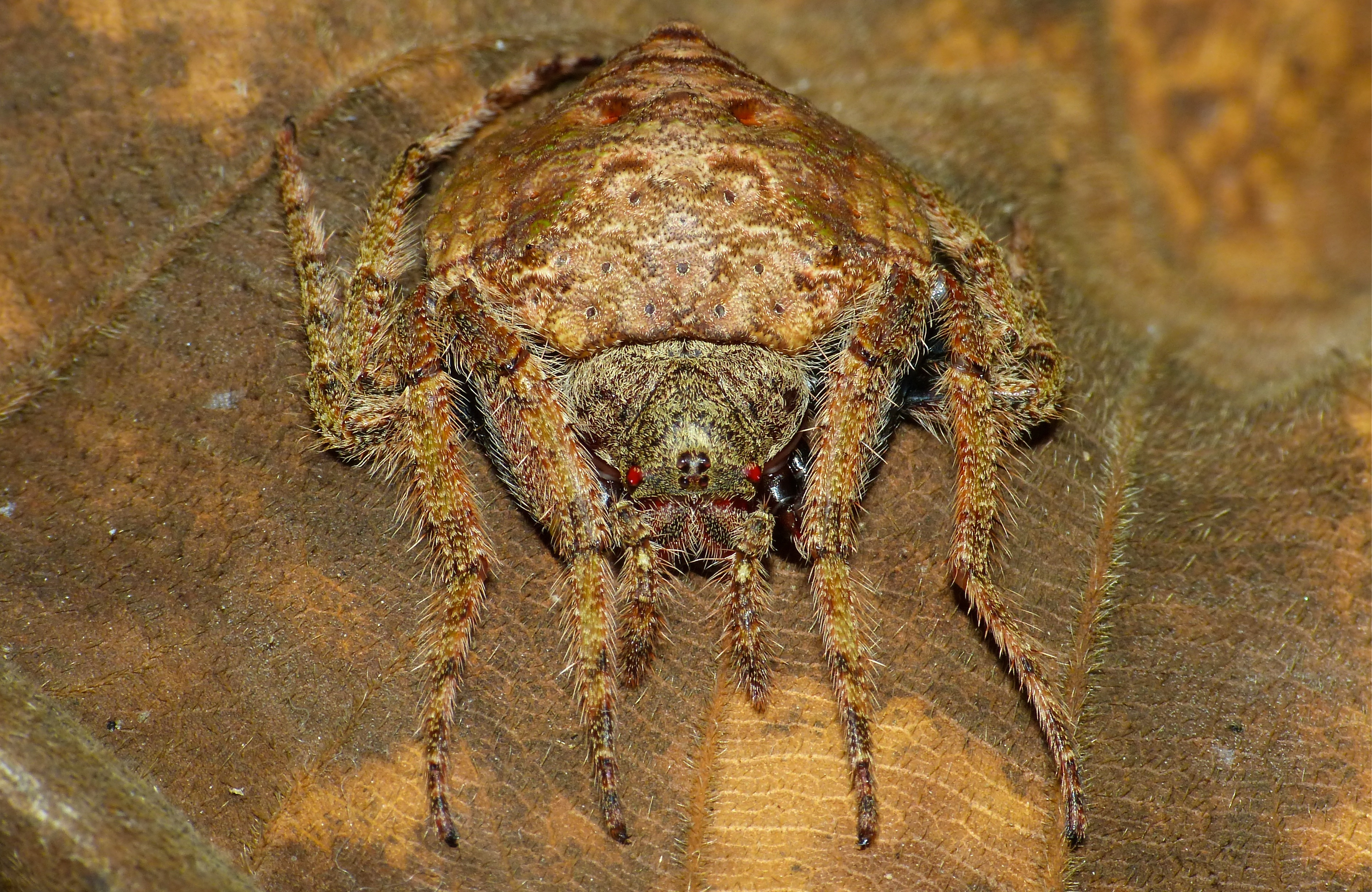 Taman Negara NP, Pahang, MALAYSIA